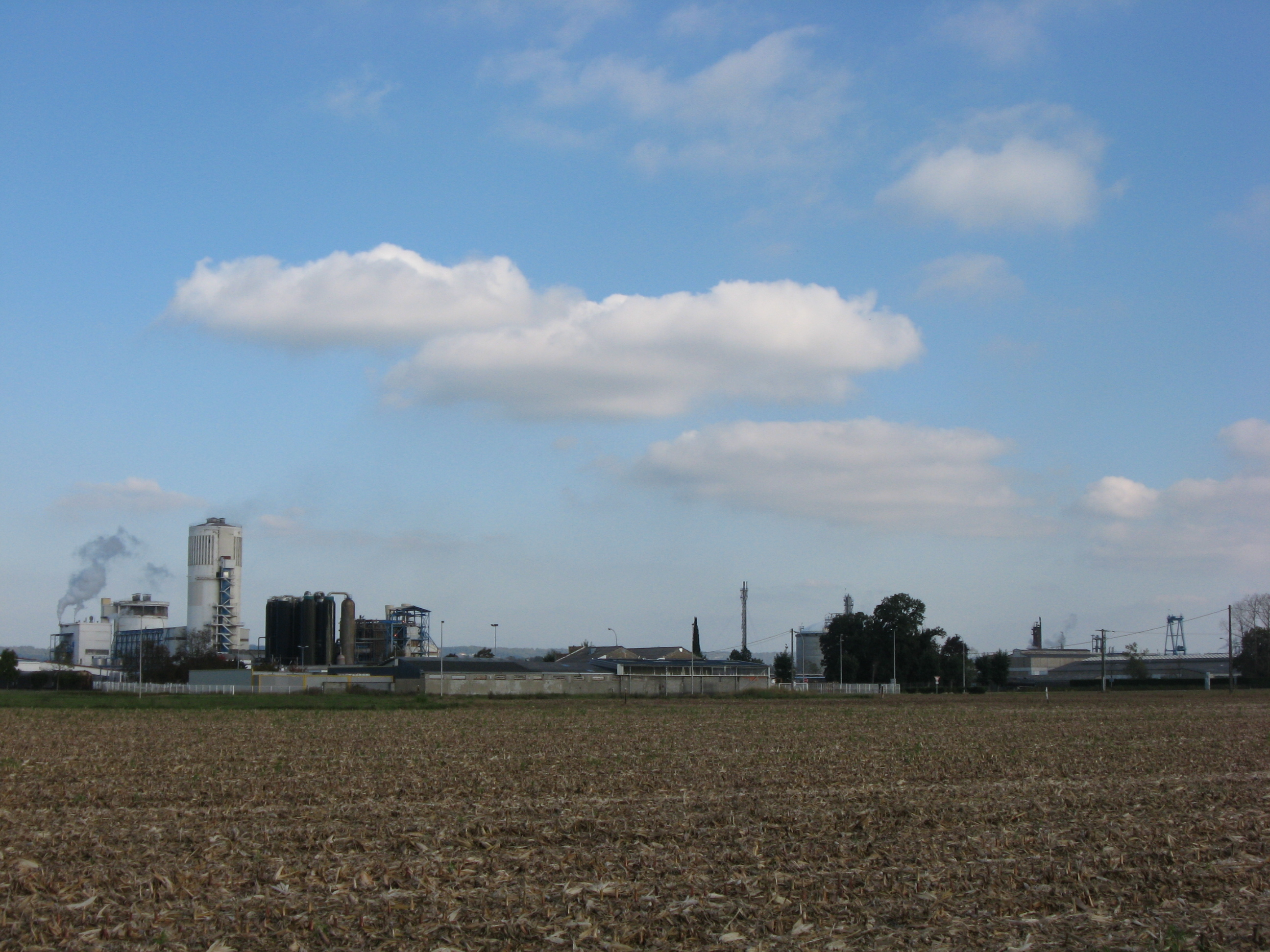 Vue du pôle industriel de Noguères (Pyrénées-Atlantiques) Pyrénées).